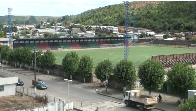 Estadio Municipal Raúl Erazo